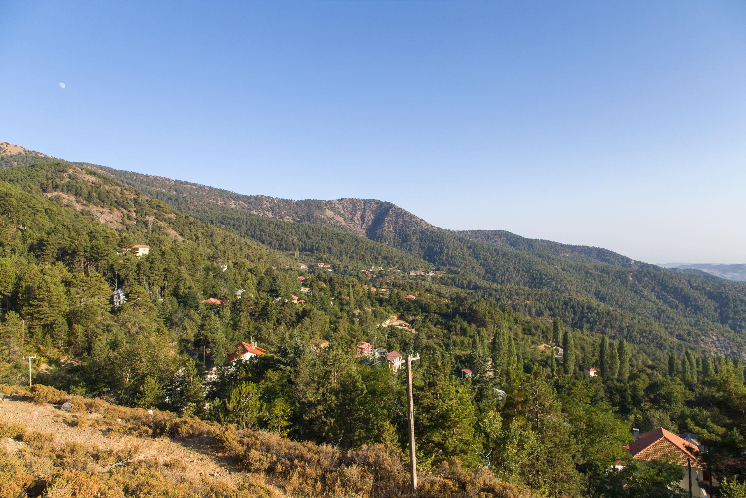 Prodromos